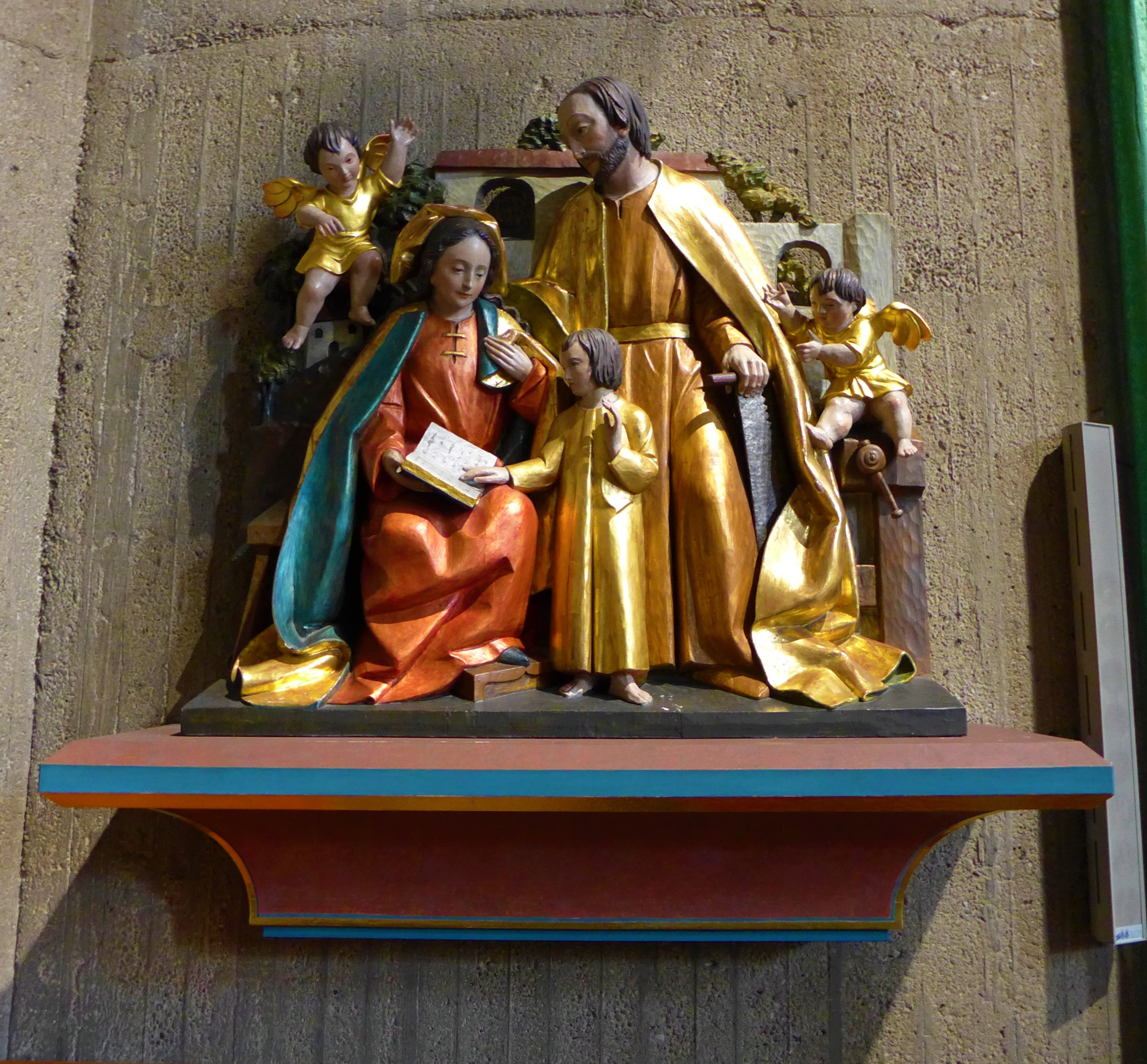 St. Ludwig (Saarlouis), Skulptur "Die heilige Familie"